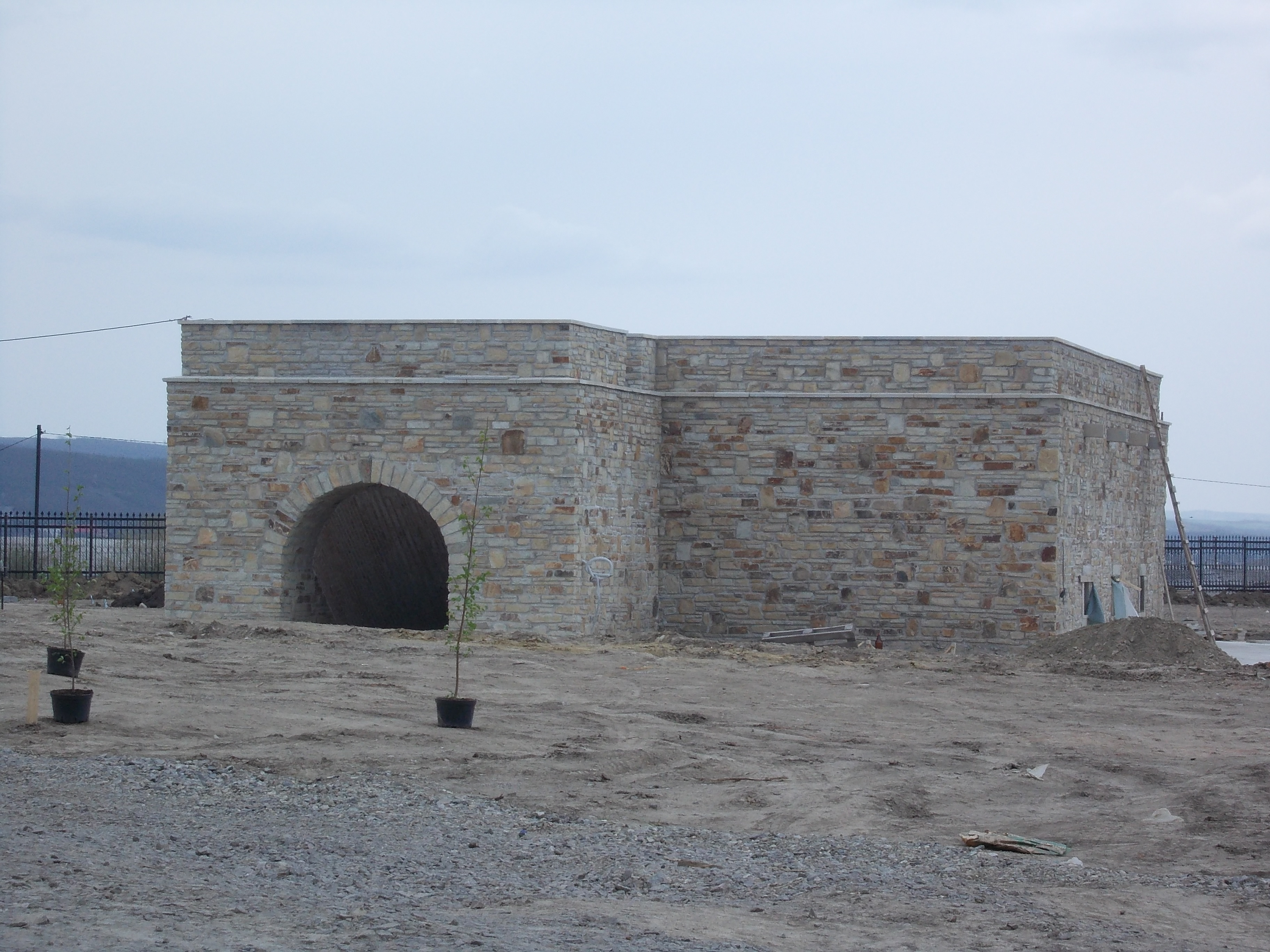 Parte a complexului curţii domneşti din Vaslui